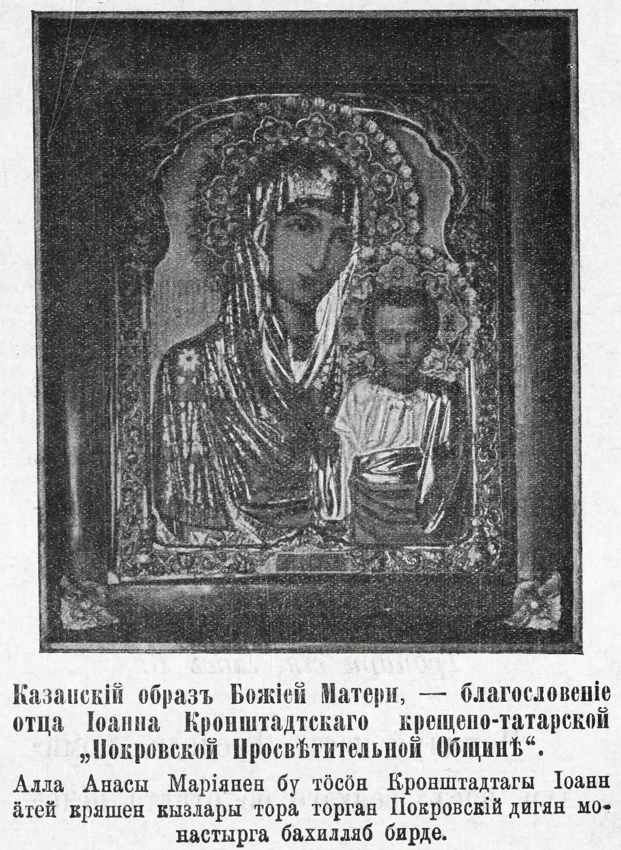 Казанский образ Божией Матери – благословение о. Иоанна Кронштадтского Покровской просветительной крещёно-татарской женской общине. Сканировано из: Акафист Покрову Пресвятыя Богородицы. На славянском и крещёно-татарском языках. Благословение Покровской Крещёно-татарской женской Просветительной Общины (Казанской губ., Мамадышского уезда, почт. отд. Нырты)// Издание 2-е. – Казань: Типография Университета, 1910. – С. (3).